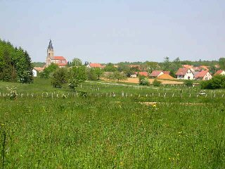 Village de Vézelois (Territoire de Belfort) Photo prise en mai 2004 par LP90 Copyright : licence GFDL LP90 mai 2004